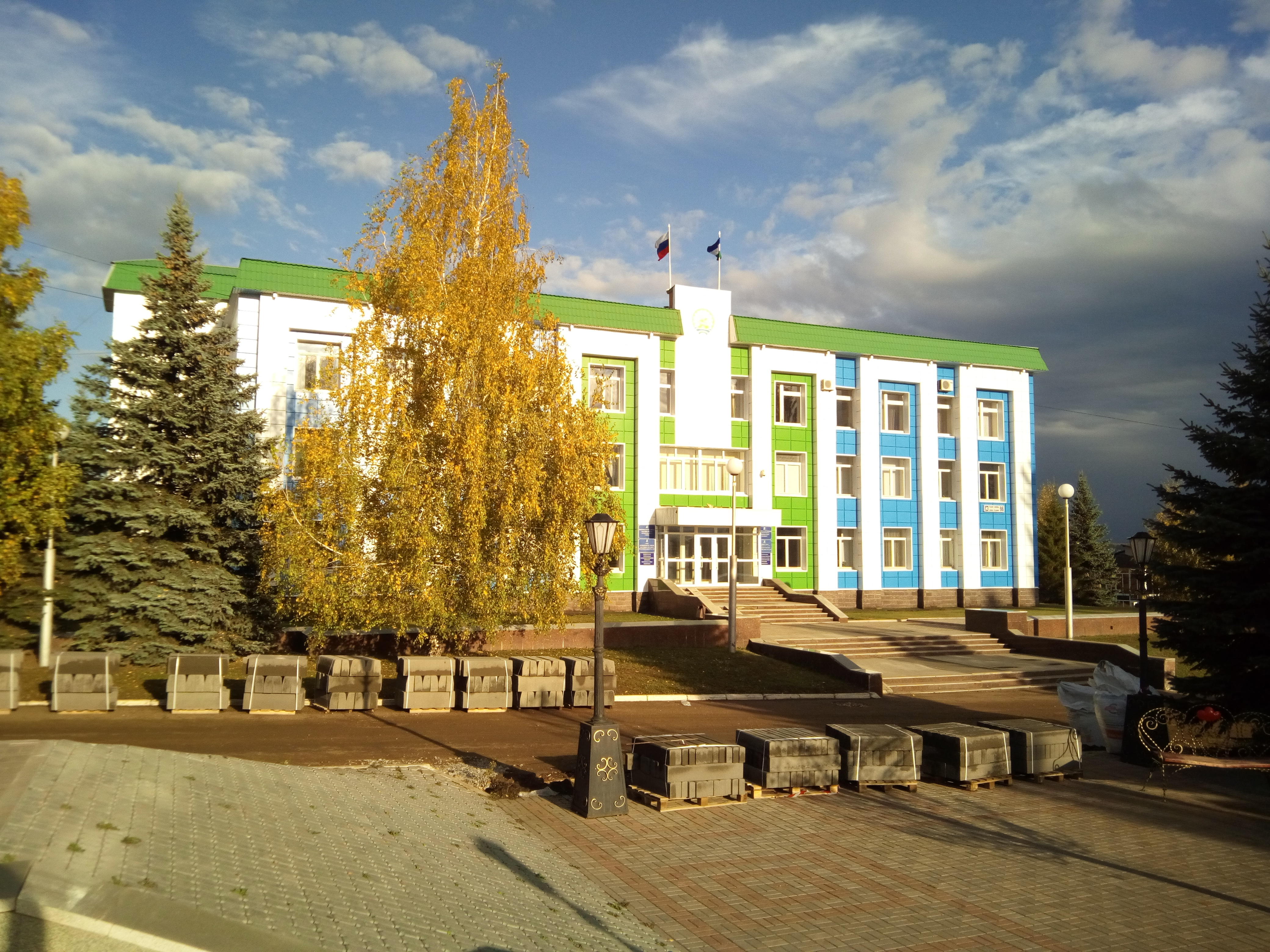 Благове́щенск — административный центр Благовещенского района Республики Башкортостан Башҡортса: Благовещен — Башҡортостандың Благовещен районының административ үҙәге.